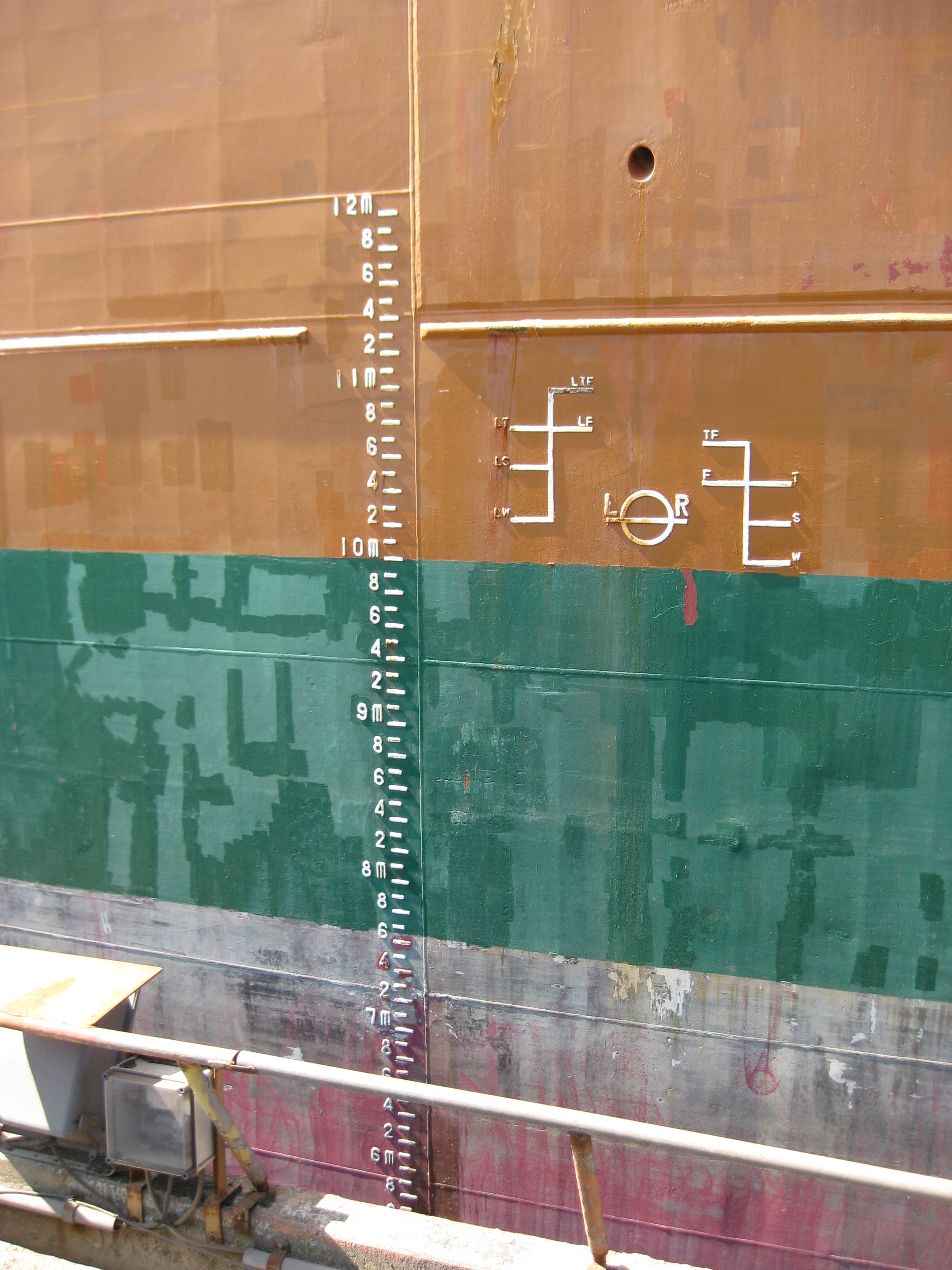 Het Plimsollmerk op een zeeschip